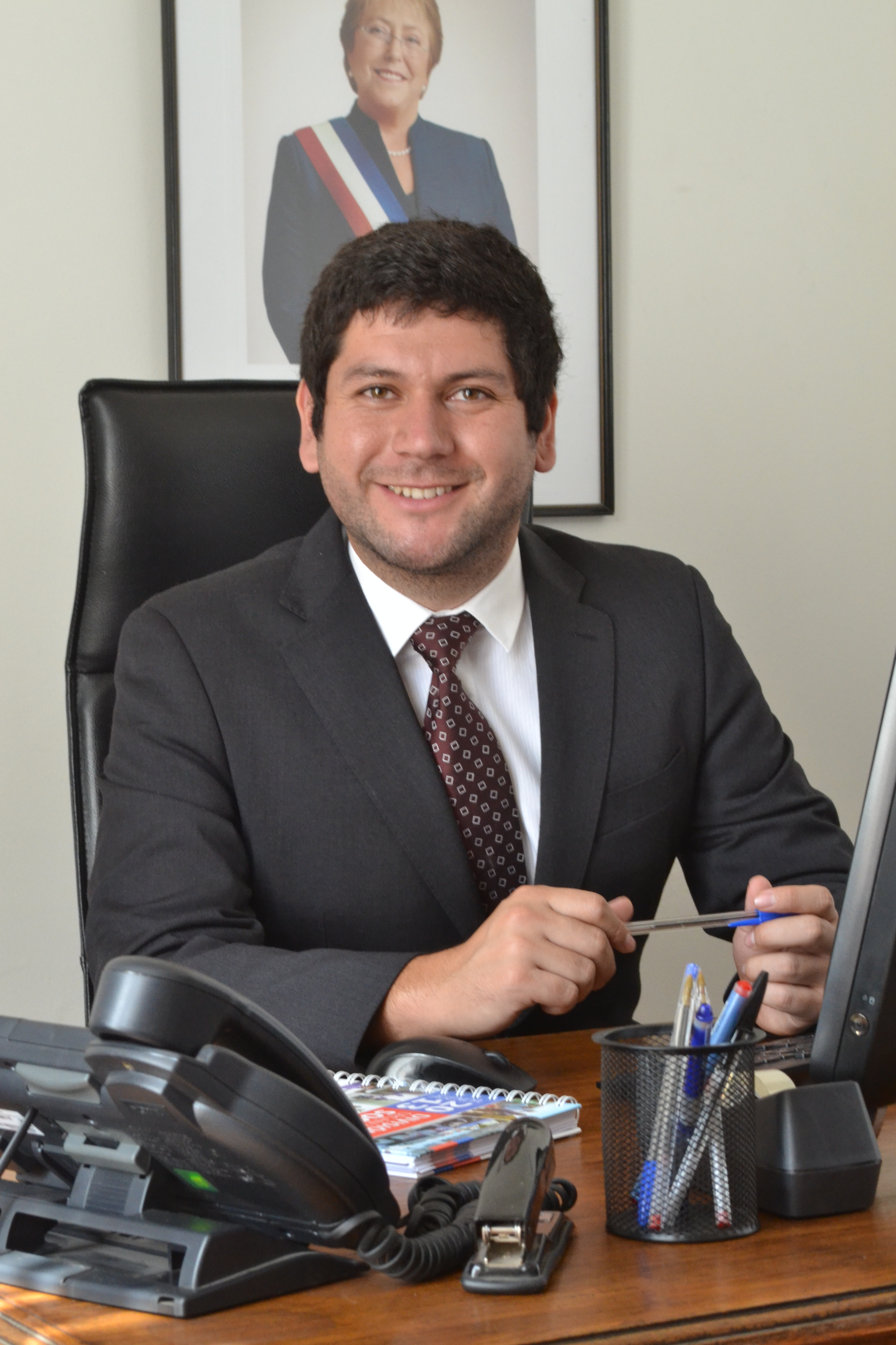 Camilo Ballesteros Briones Director Nacional de la División de Organizaciones Sociales foto reseña Camilo BallesterosLicenciado en Ciencias de la Actividad Física por la Universidad de Santiago de Chile (USACH) y alumno del Programa de Magíster en Gerencia y Políticas Públicas en esa misma casa de estudios superiores. Fue presidente de la Federación de Estudiantes de la Universidad de Santiago (FEUSACH) durante el período 2010-2011, en el que también formó parte de la mesa ejecutiva de la Confederación Nacional de Estudiantes de Chile (CONFECH), transformándose en una importante figura en la movilización estudiantil de 2011. Ballesteros terminó el período de su presidencia al mando de la FEUSACH proyectándose como una de las principales figuras del Partido Comunista (PC), organización de la que es militante. En las elecciones municipales de 2012 se presentó como candidato a alcalde por la comuna de Estación Central, obteniendo una importante adhesión ciudadana. Hoy asume con entusiasmo el desafío de encabezar la División de Organizaciones Sociales, y ratifica su compromiso de trabajar por el fortalecimiento de la sociedad civil y la profundización de la participación ciudadana, en el marco del Programa de Gobierno de la presidenta Michelle Bachelet.